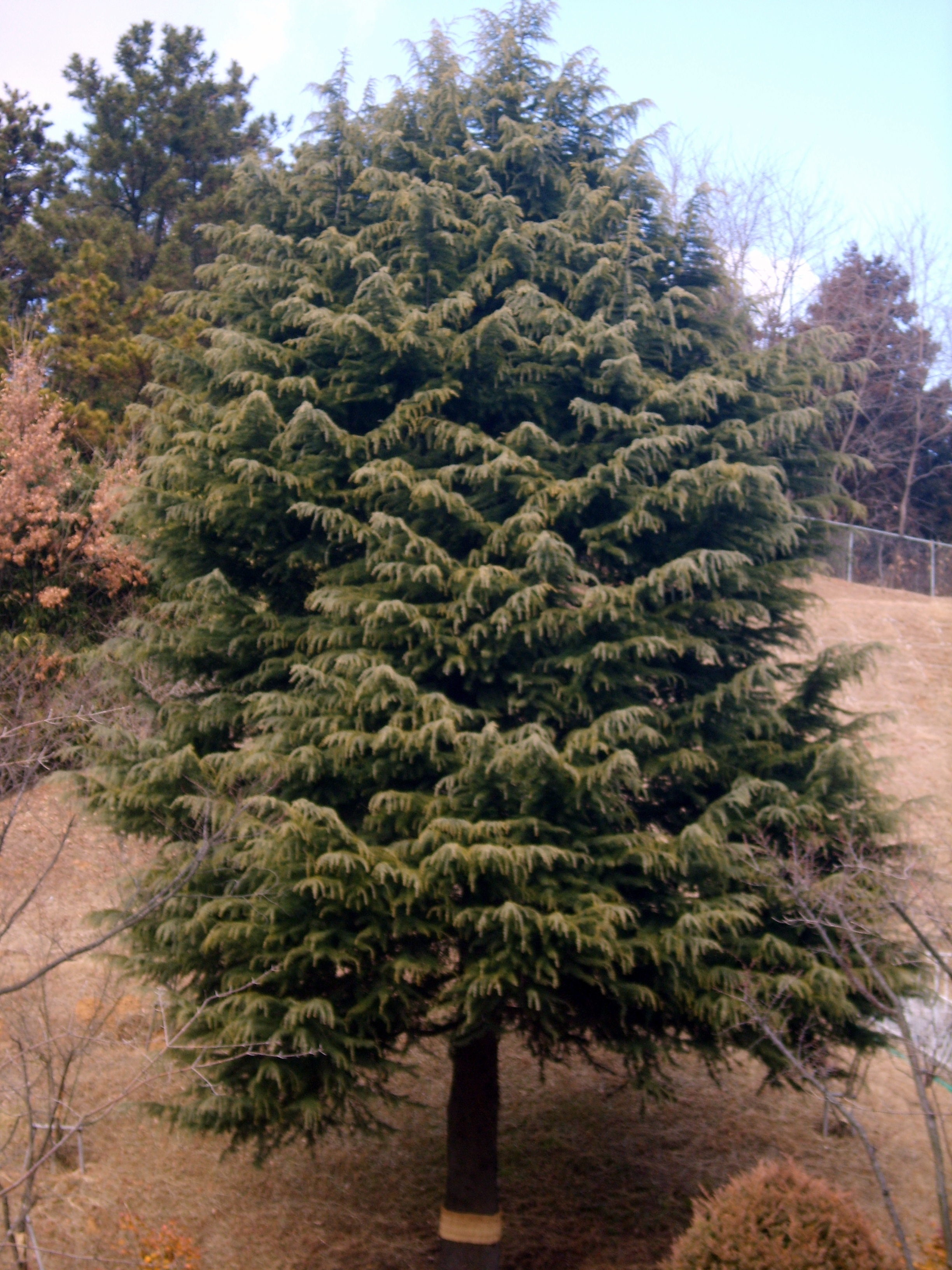 Deodar Cedar in Gwangju Korea. 광주국립박물관 본관 뒤에 있는 개잎갈나무.